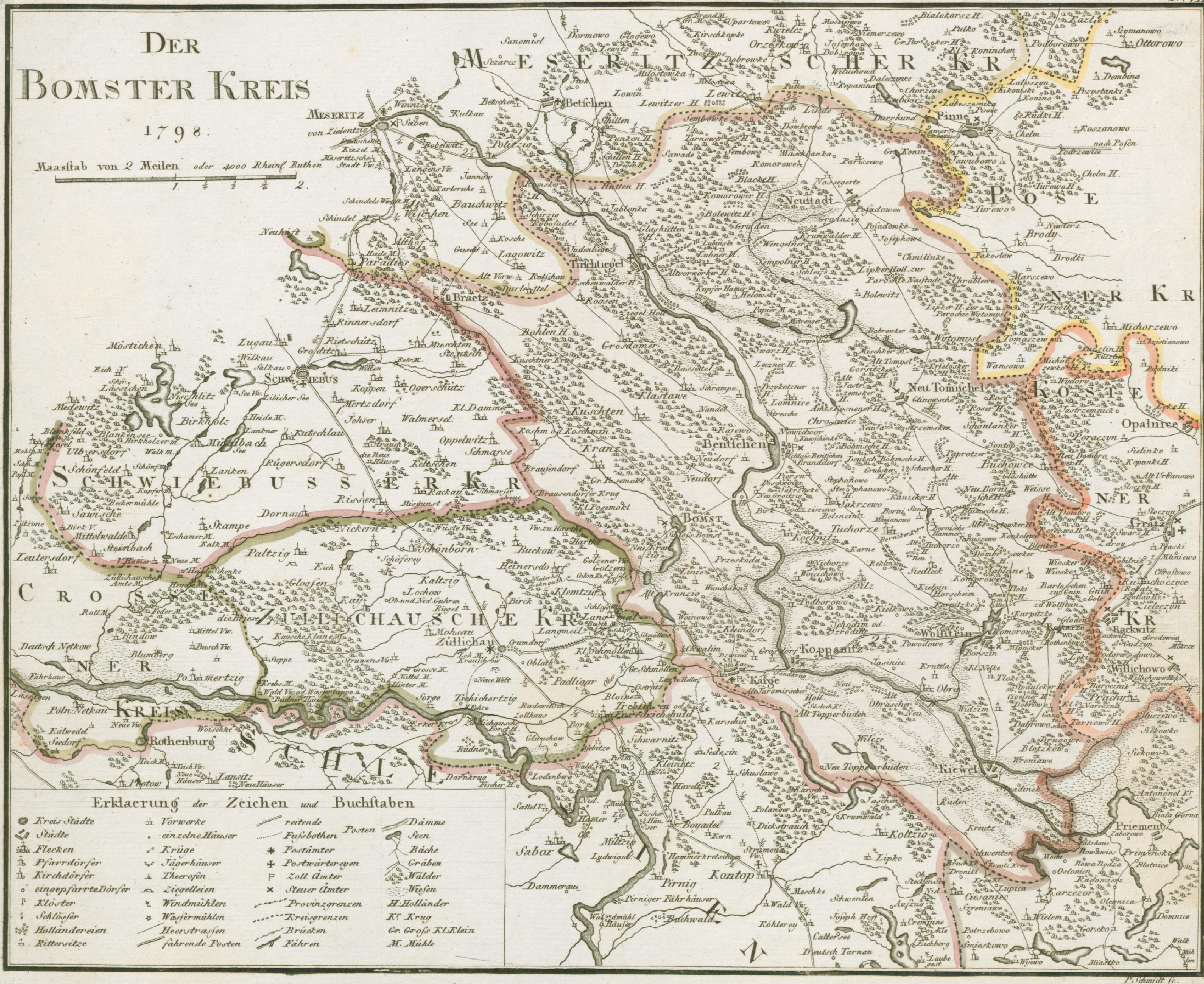 Map of "Kreis Bomst" as of 1798